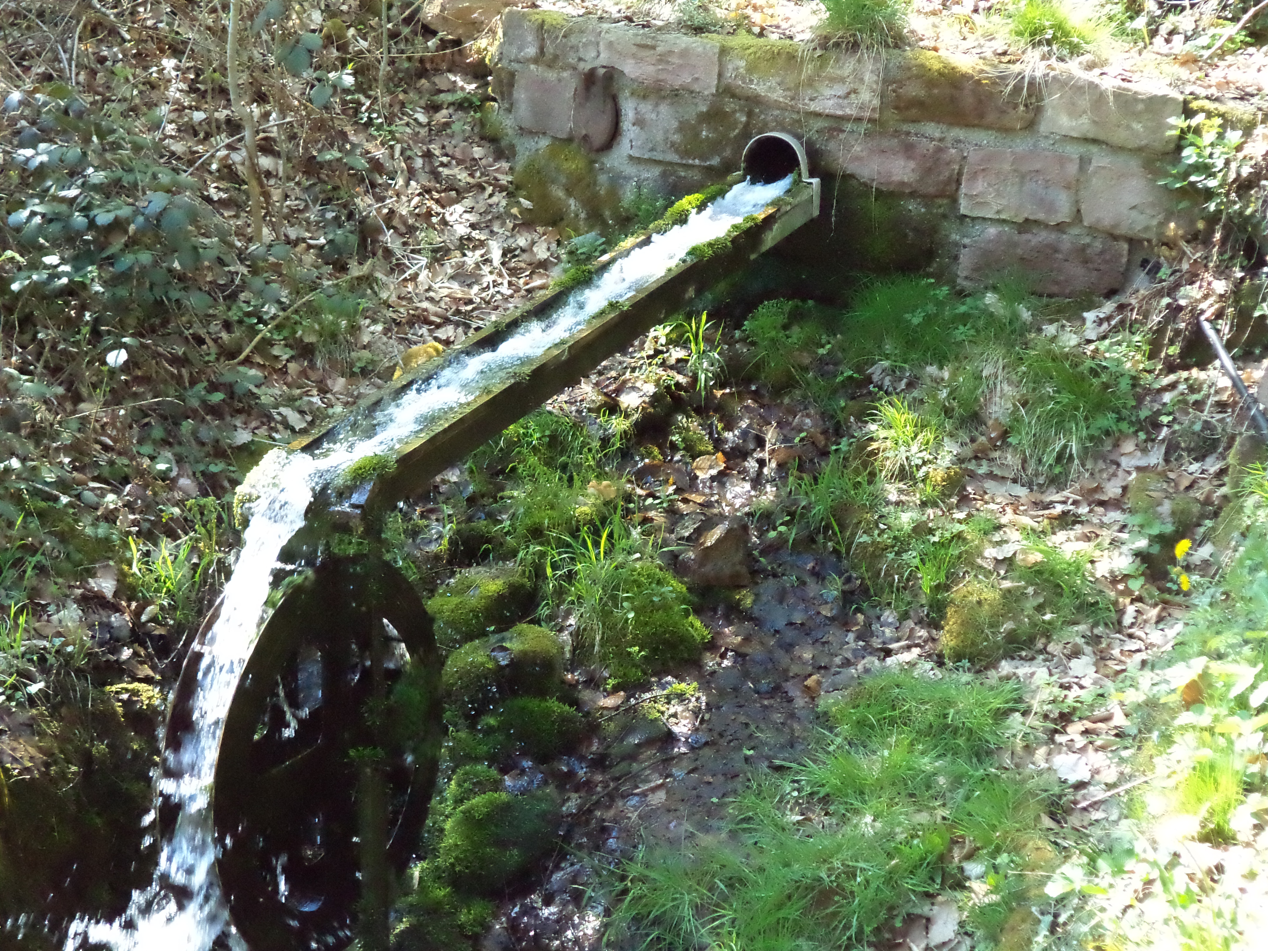 Die Speyersbergquelle im Tal des Wittbachs zwischen Unterwittbach und Kreuzwertheim an der sog. Widderstube.